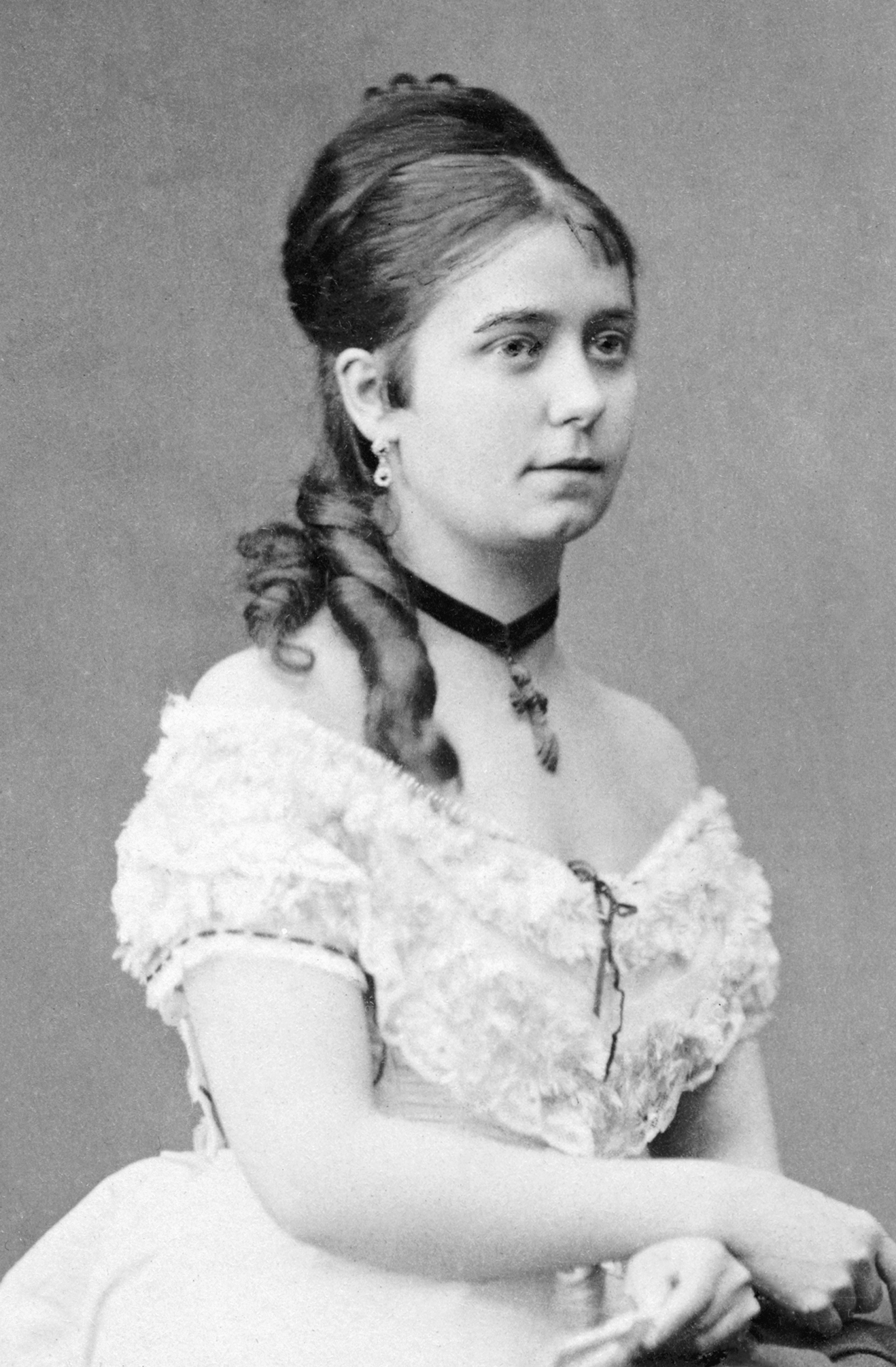 Olena Falkman, operasångare. Odaterat porträtt